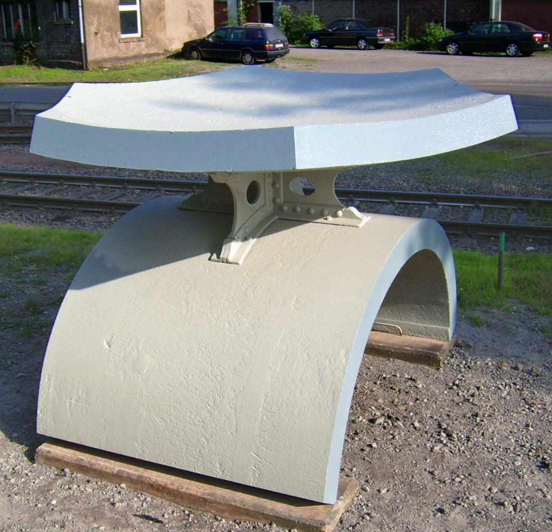 200mm dicke Panzerplatten ausgestellt auf einer Weltausstellung Ende des 19. Jahrhunderts